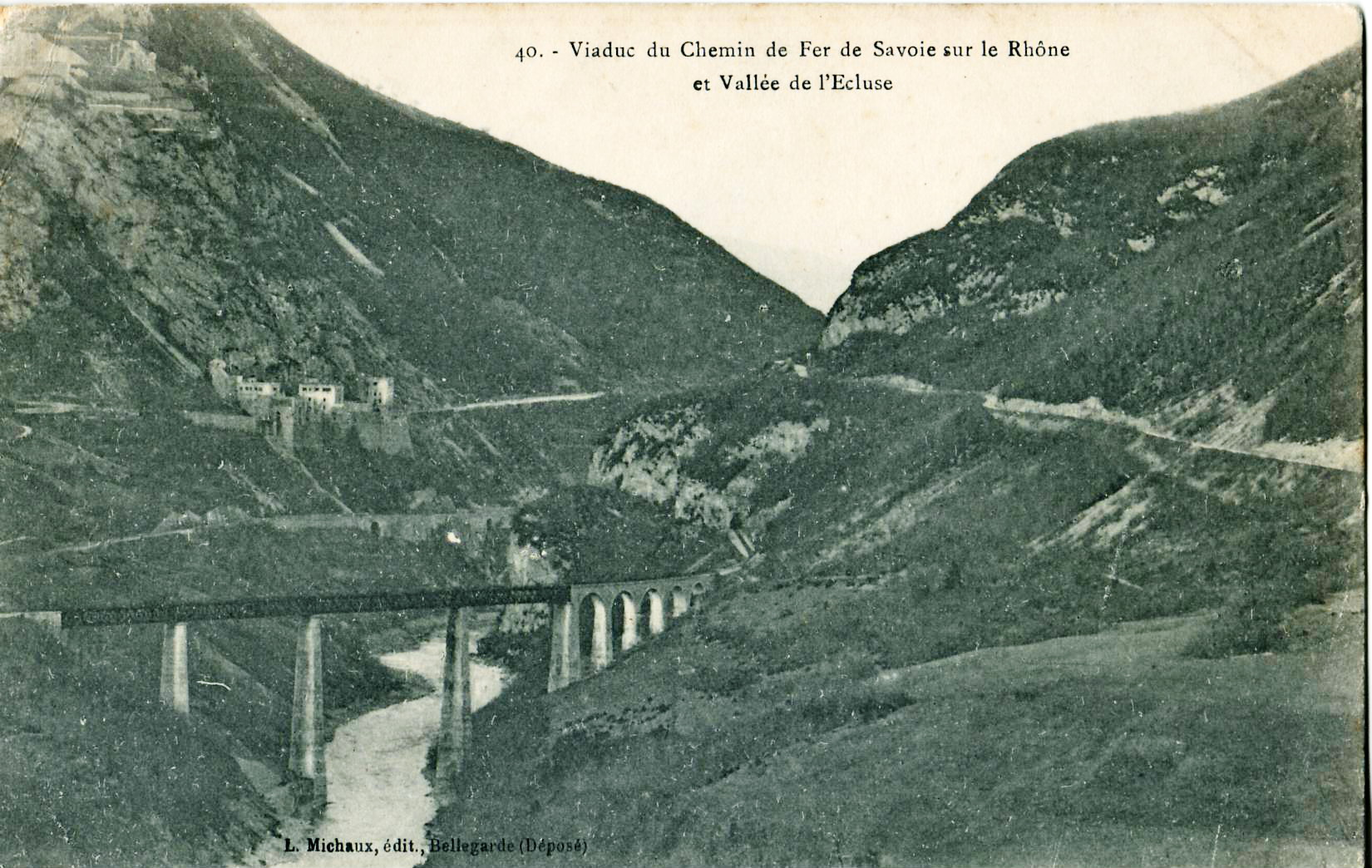 Carte postale ancienne éditée par L. Michaux à Bellegarde, n°40 :Viaduc du Chemin de fer de Savoie sur le Rhône et Vallée de l'Ecluse